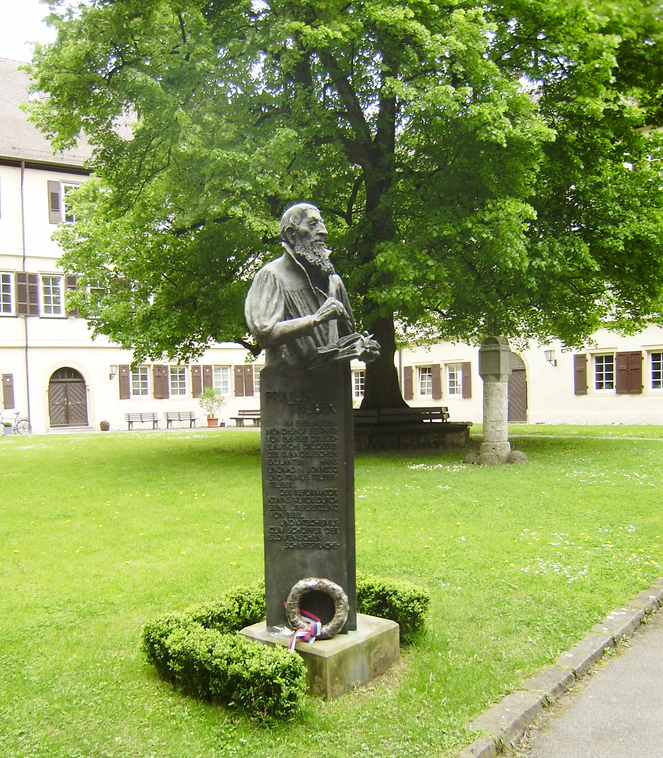 Kip Primoža Trubarja v Bad Urachu.